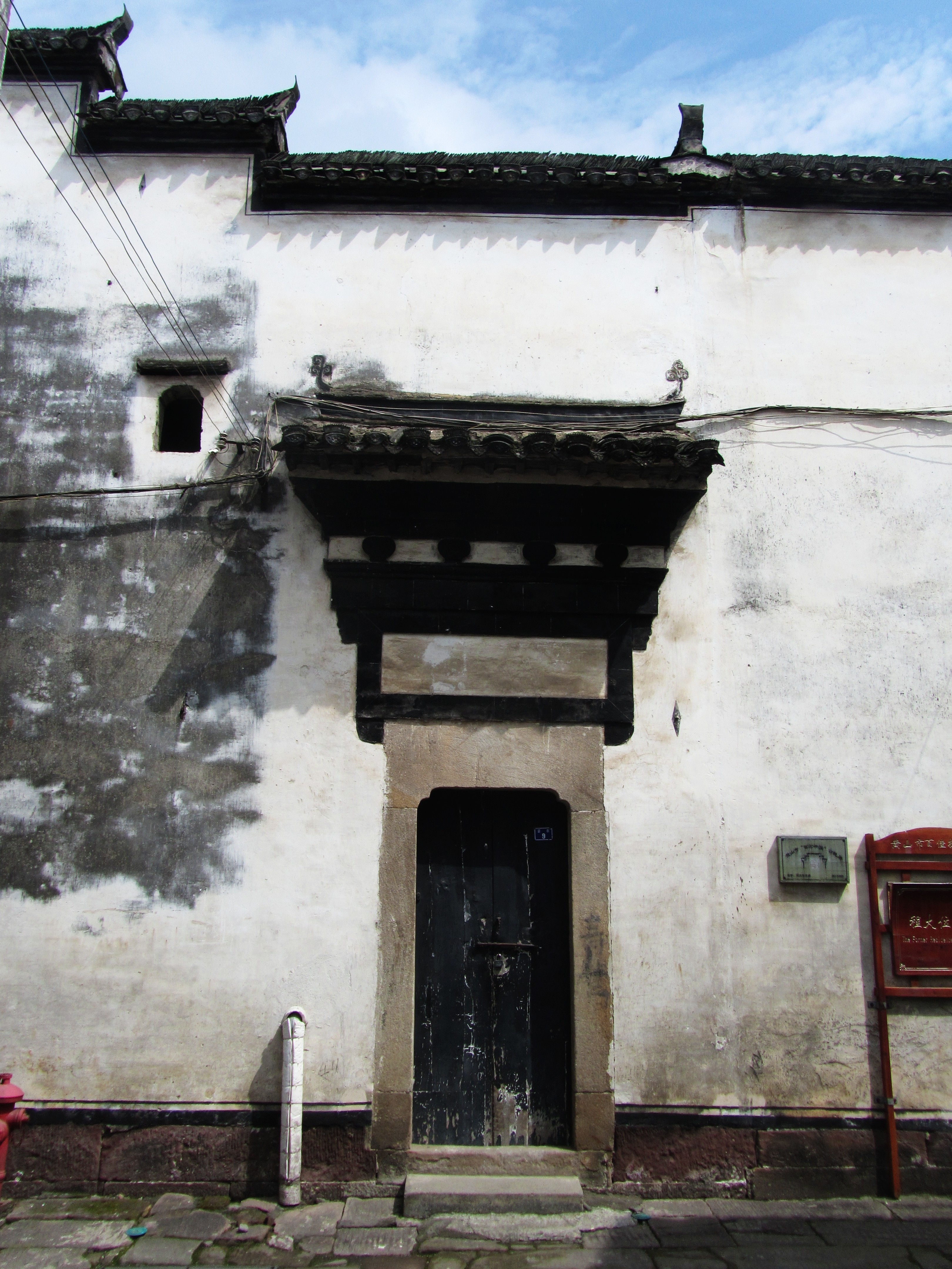 程大位故居，西侧门外侧，左为祭祖楼。